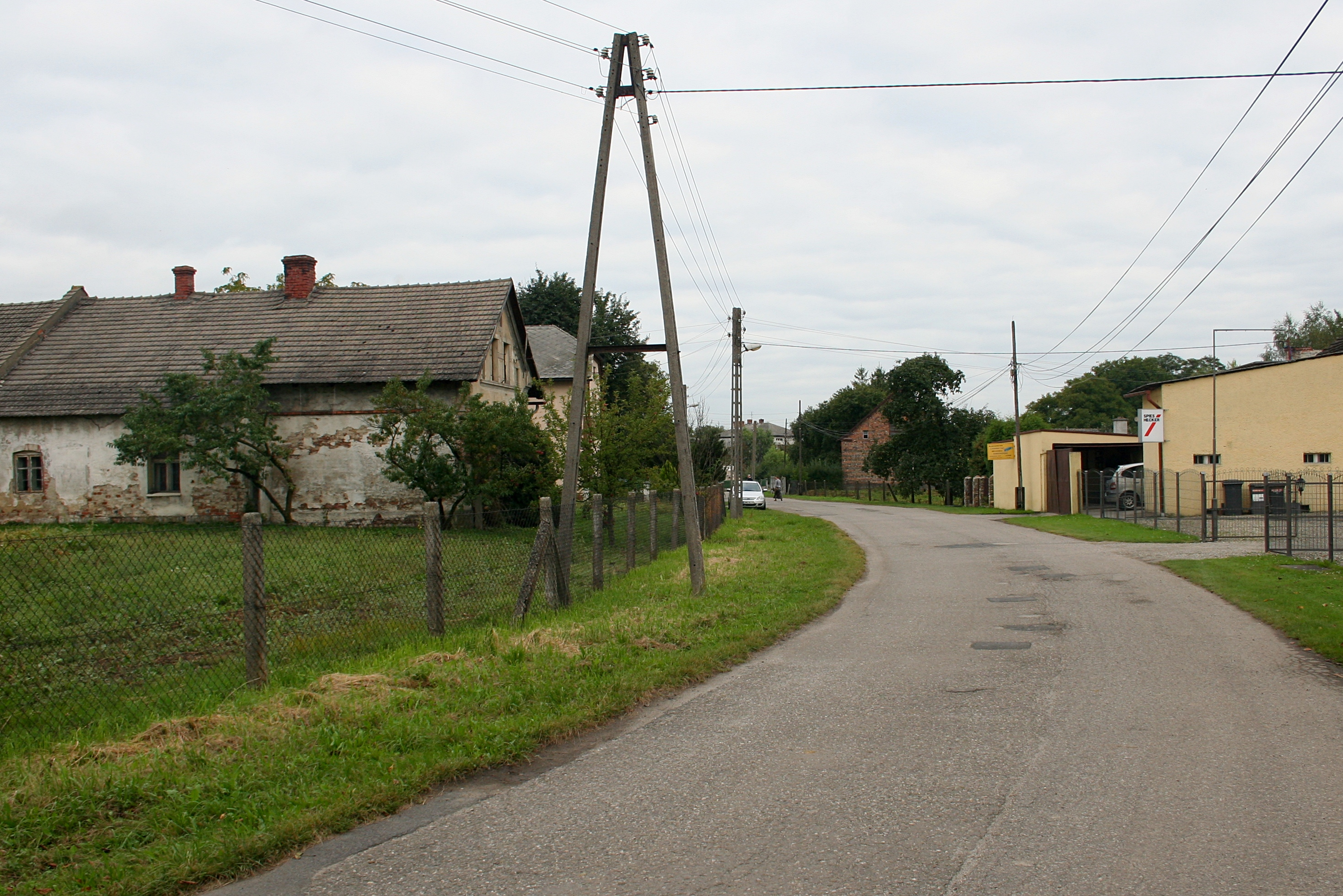 Ulica Rzeczna w Nieboczowach, woj. śląskie